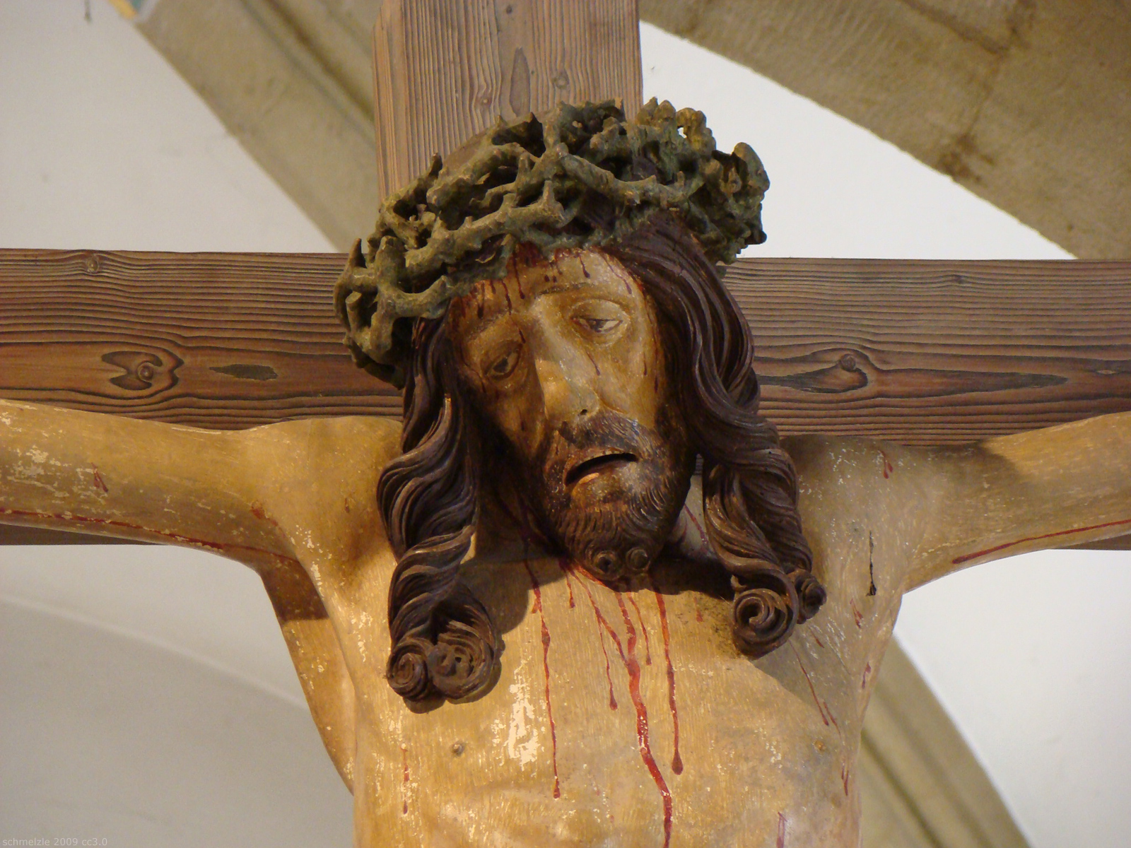 Detail aus der Stadtkirche St. Jakobus in Brackenheim